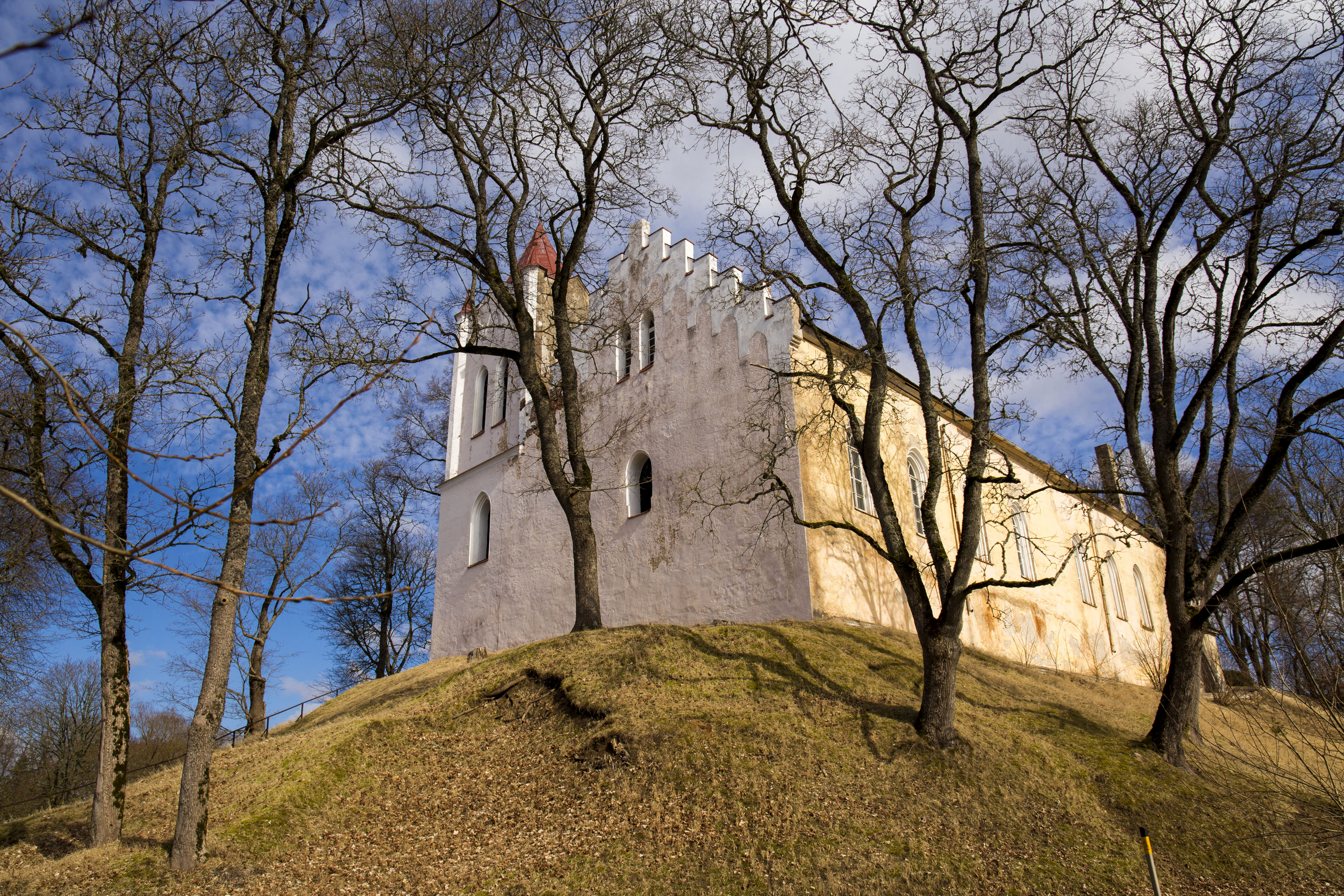 Aizputes Sv.Jāņa luterāņu baznīca, Aizpute, Liepājas iela 3